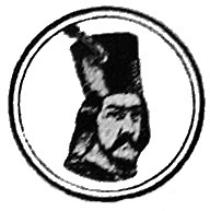 Dan II. Valašský.